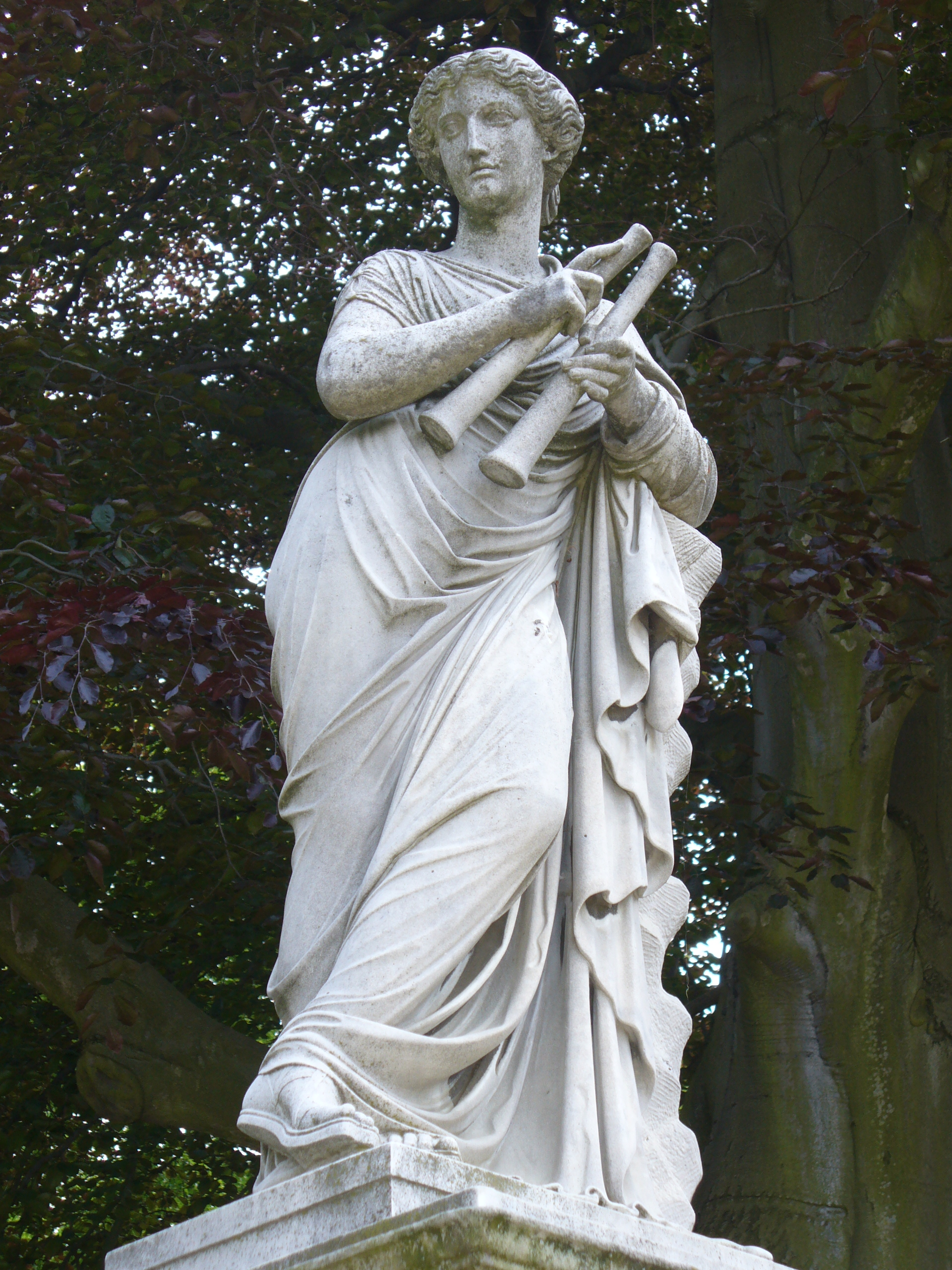 Euterpe(Muse der Lyrik und des Flötenspiels)auf Brunnenwand(1857)-Friedrich Ochs-Sanssouci